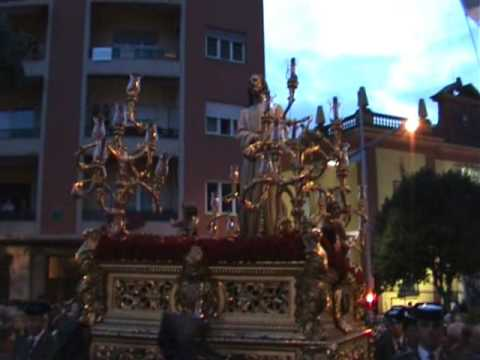 Jesús Preso